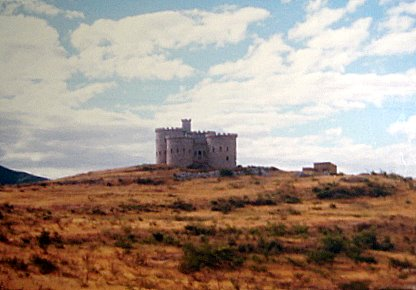 Castelo Di Bivar (Carnaúba dos Dantas-RN)